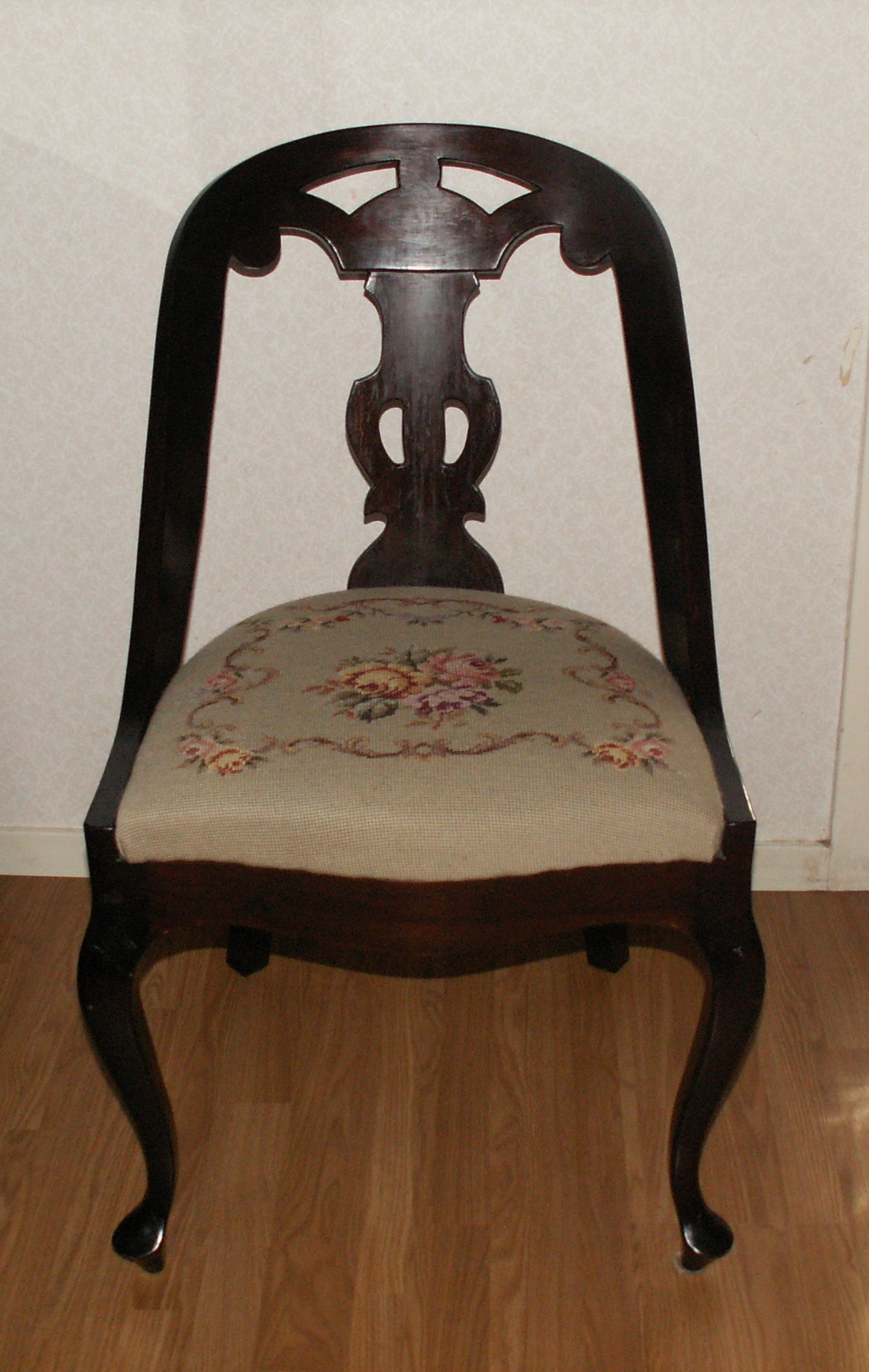 Göteborgsstol, tillverkad av August Johansson i Lindome under (sent) 1900-tal efter äldre design. Fotograferad i Högsered i västra Lindome.